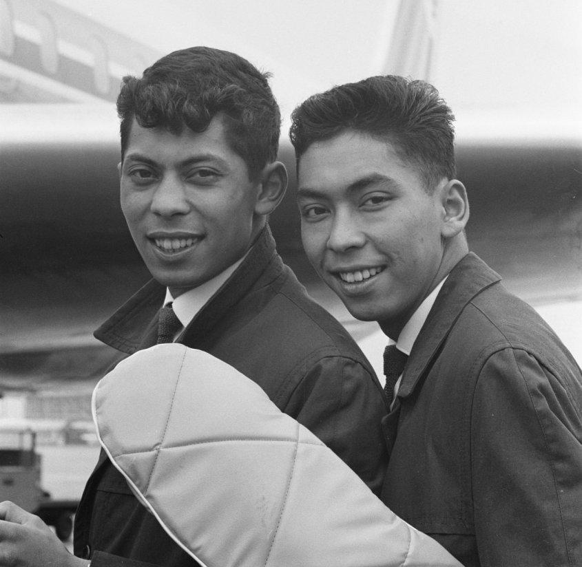 The Blue Diamonds vertrekken naar Nieuw-Guinea.